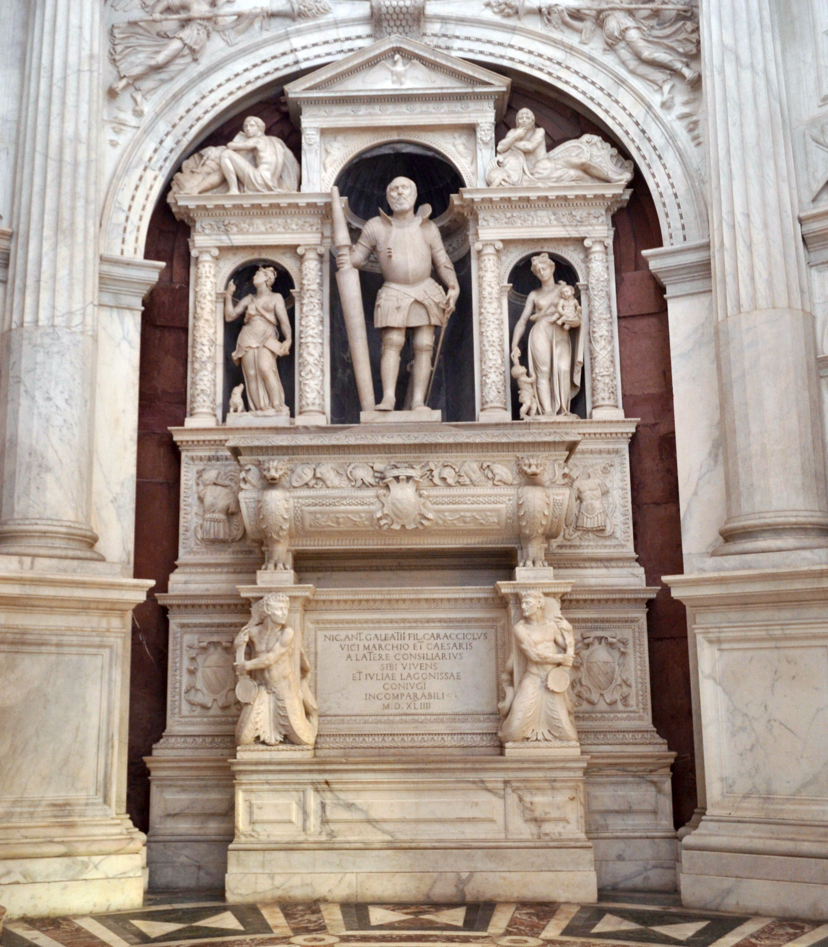 Cappella Caracciolo di Vico (chiesa di San Giovanni a Carbonara di Napoli) - Sepolcro a Nicolantonio Caracciolo di Annibale Caccavello e Girolamo D'Auria (1573)